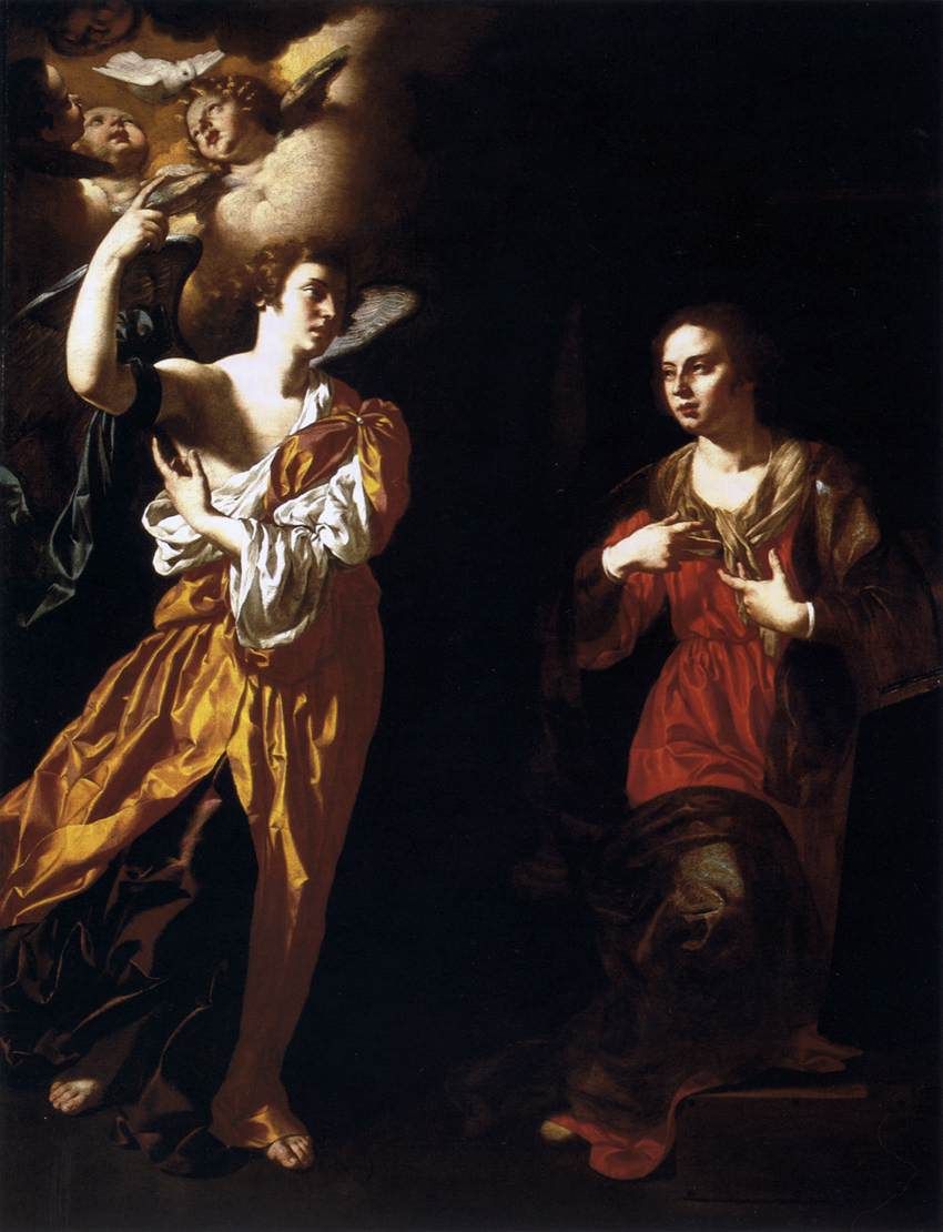 Anunciación, Museum of Fine Arts, Budapest